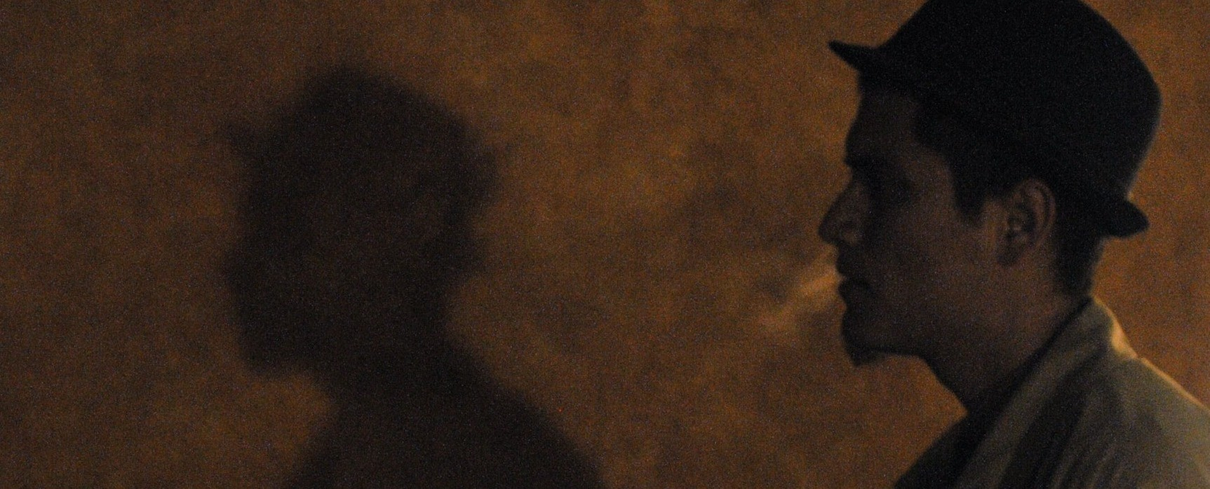 Fotografía